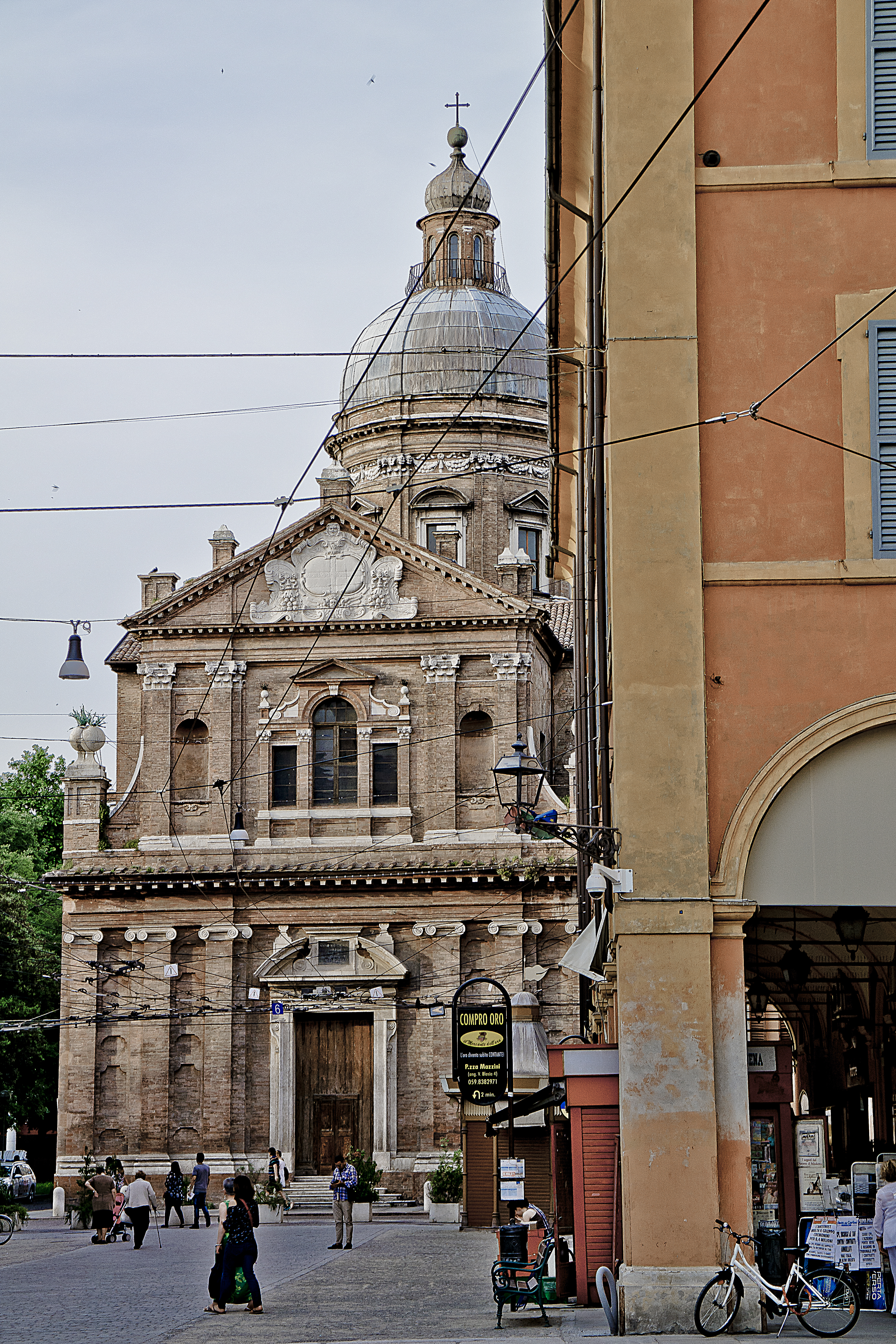 Chiesa del Voto This is a photo of a monument which is part of cultural heritage of Italy.